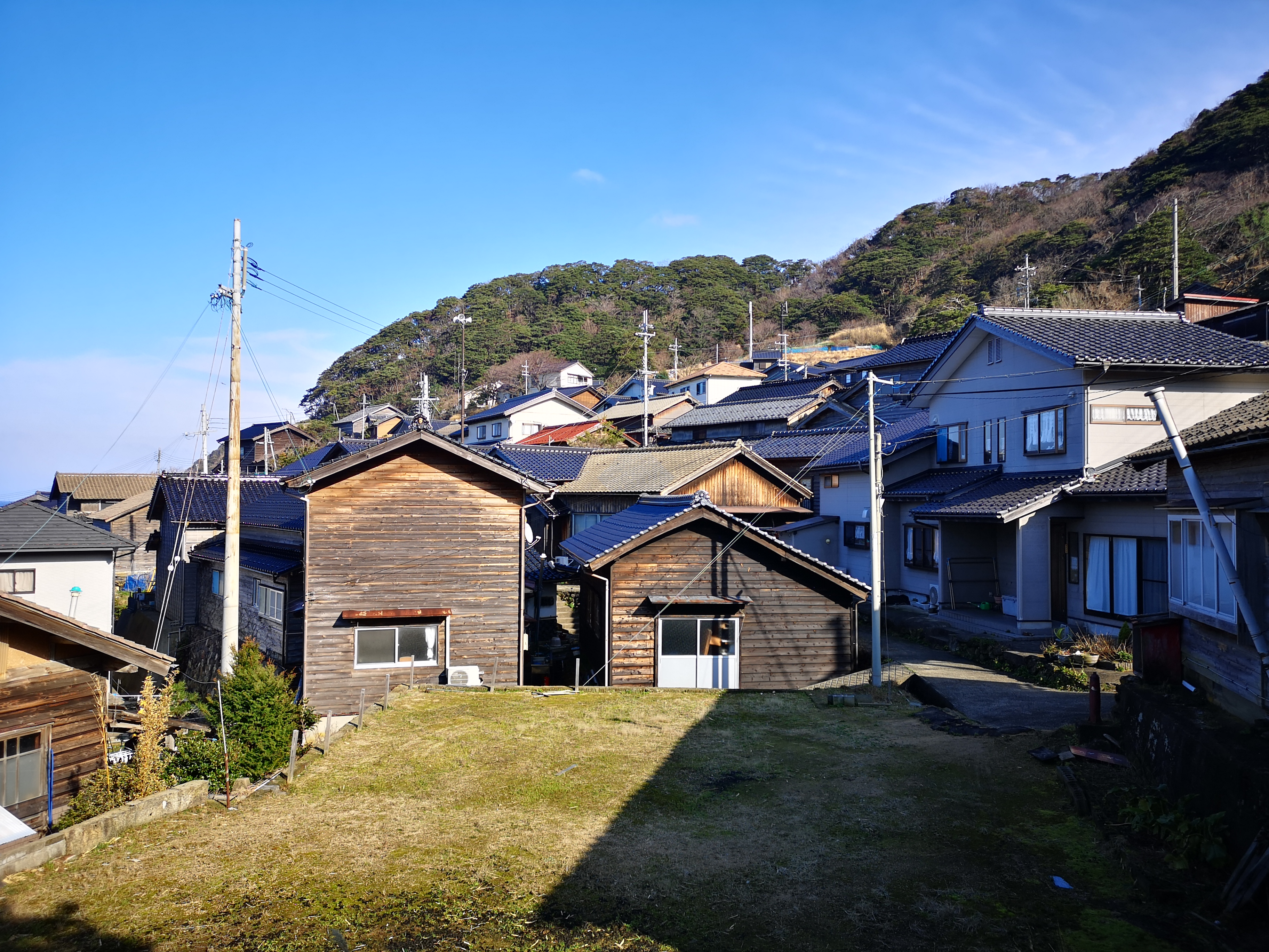 京丹後市網野町磯。静御前の生誕地としてしられる。